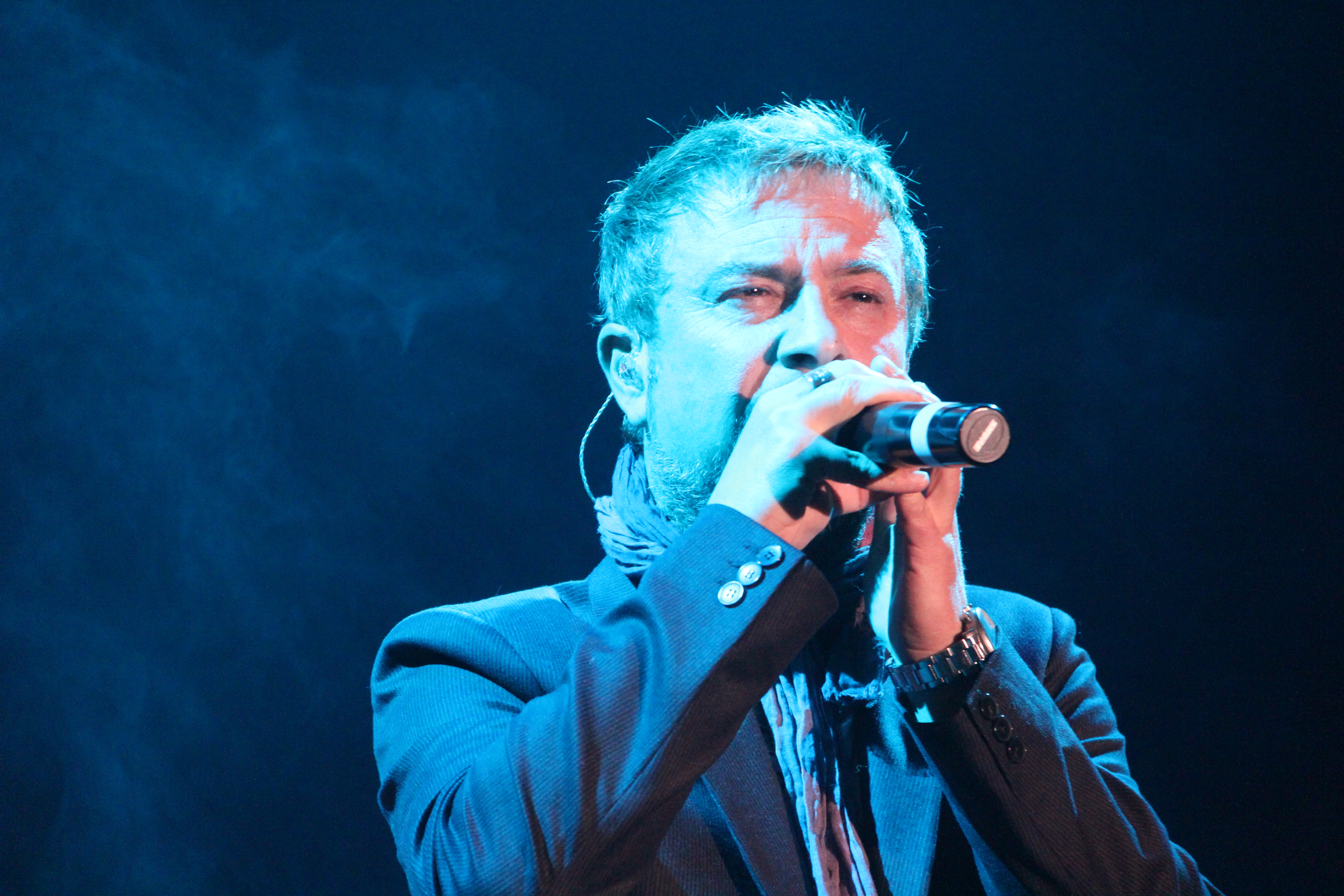 Marco Masini - Ci vorrebbe il mare